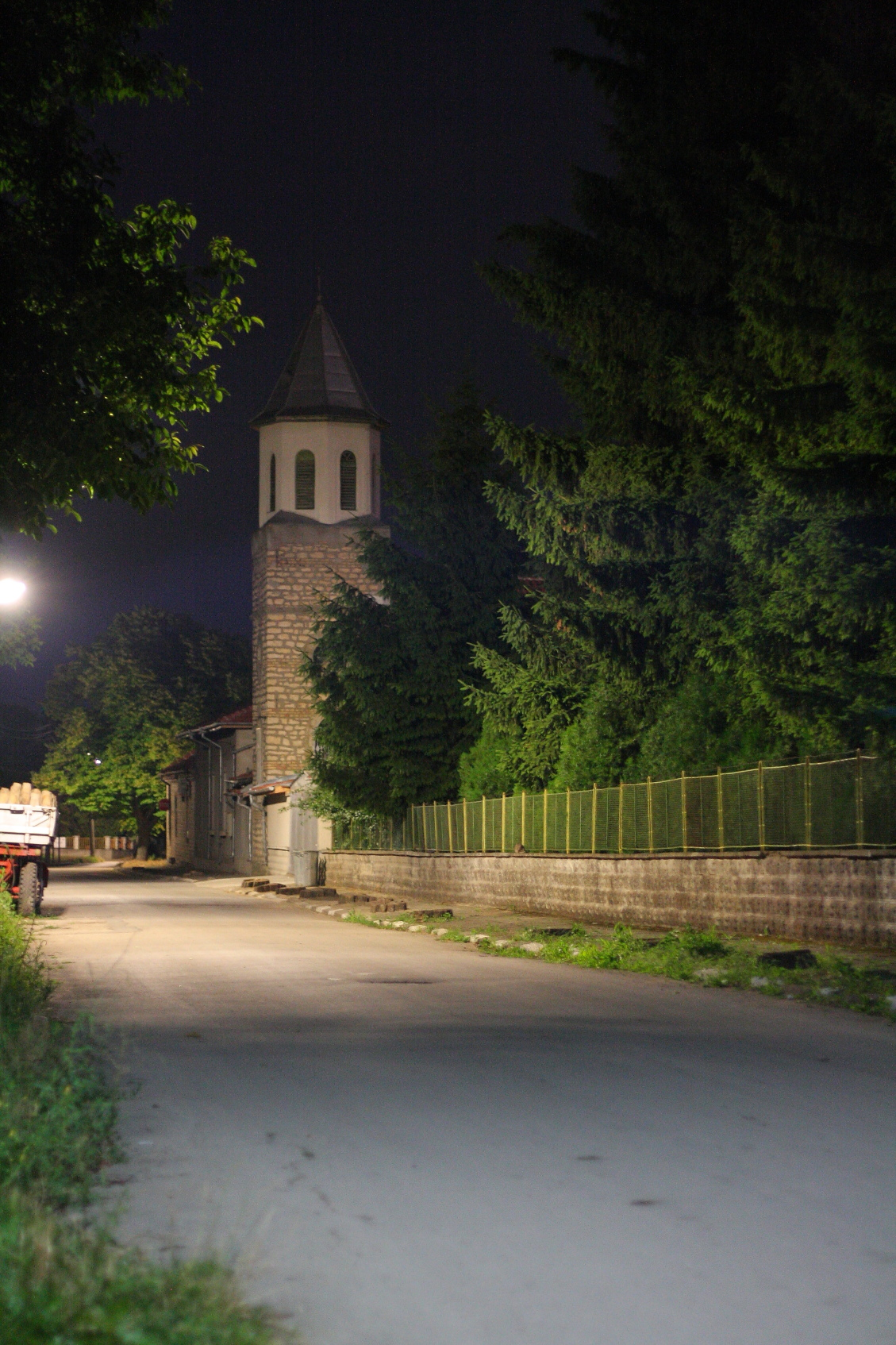 Манастир "Сестри Бенедиктинки", с. Царев брод